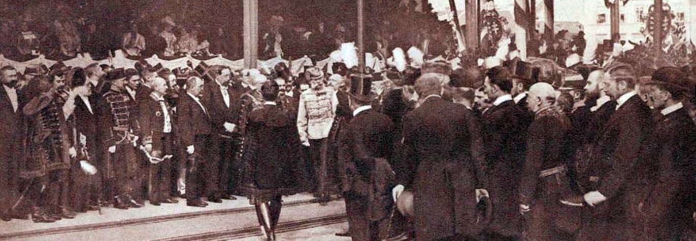 Ferenc József híd (ma Szabadság híd) avatása 1896-ban Ferenc József jelenlétében